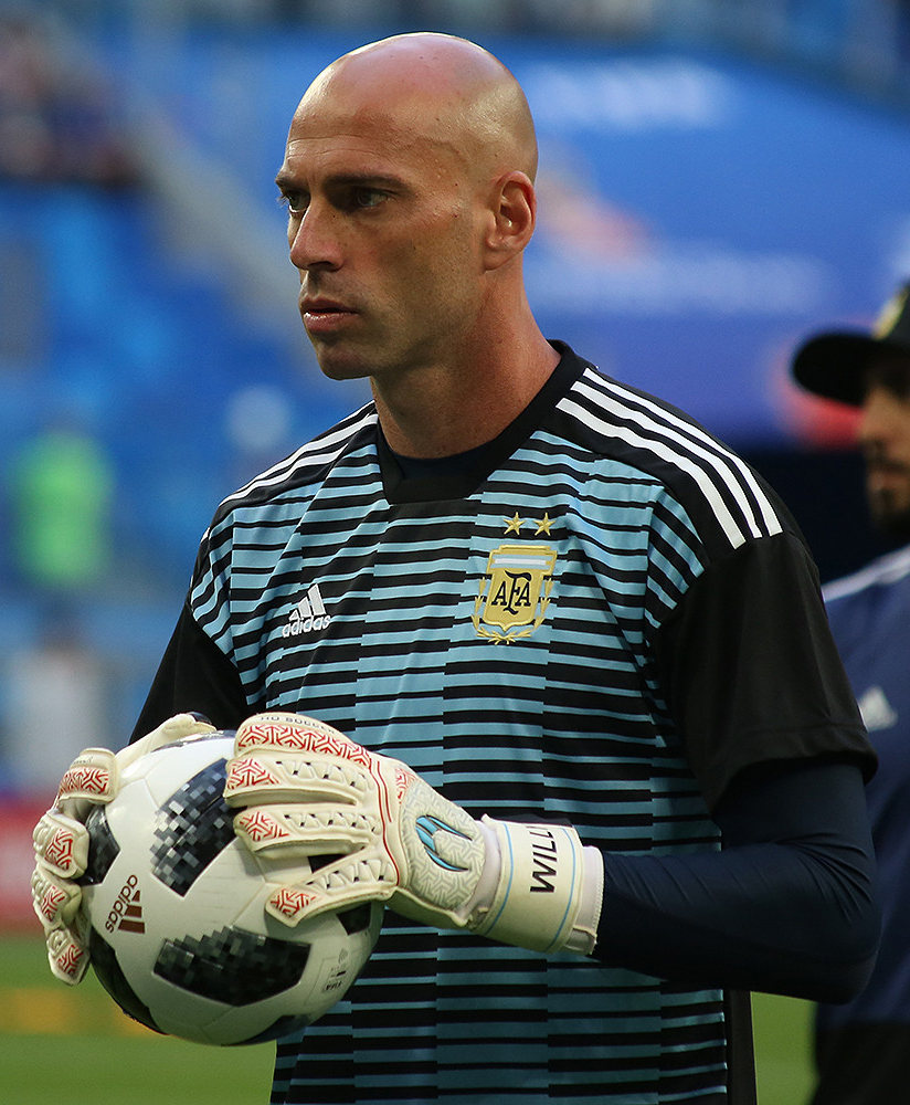 Гол Рохо в концовке выводит Аргентину в плей-офф чемпионата мира